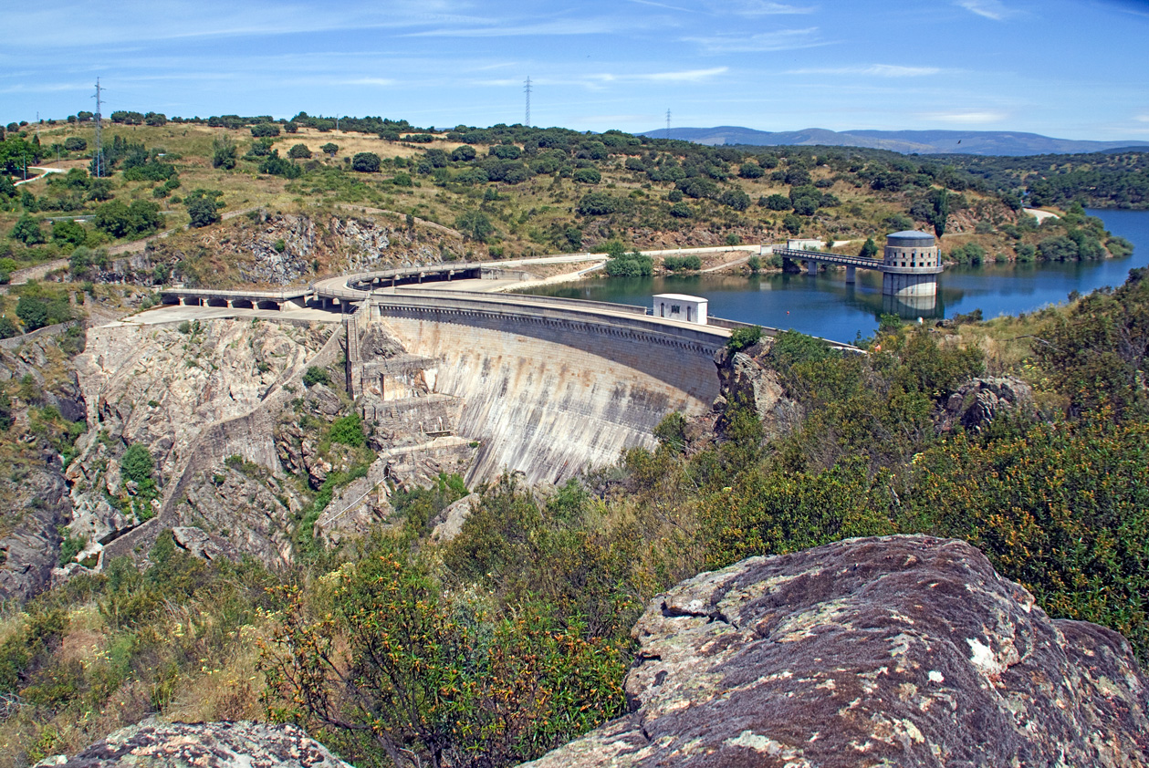 Embalse de El Villar: dique, aliviadero y torre de toma de la minicentral